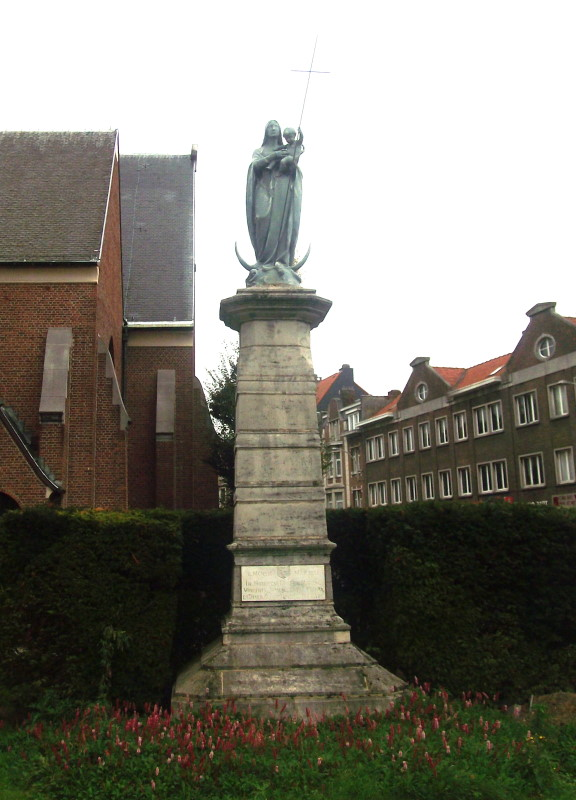 Mariabeeld Merksem